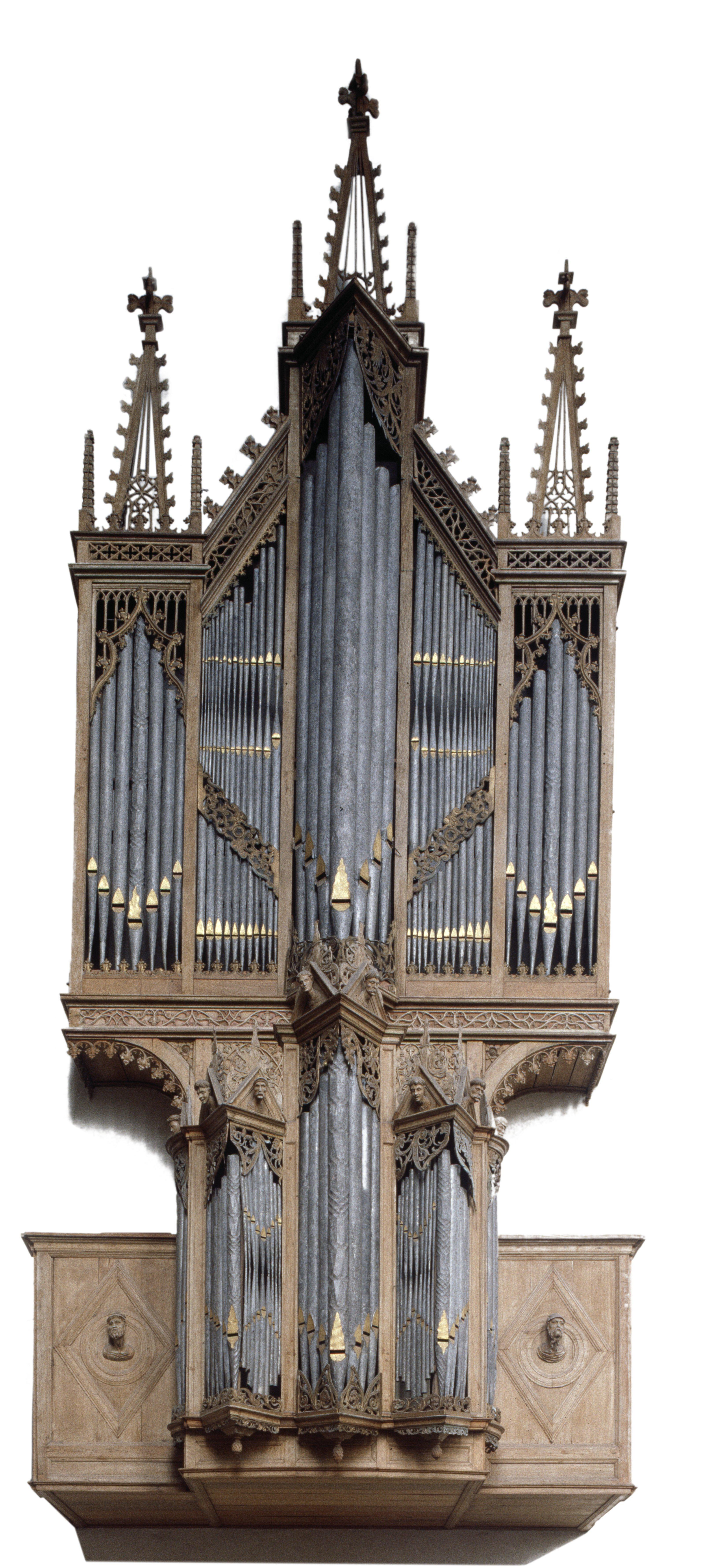 Koorkerk: Overzicht van het Nicolai-orgel, digitaal "losgemaakt" van omgeving (opmerking: Zie ook exemplaarnummer 534.427)